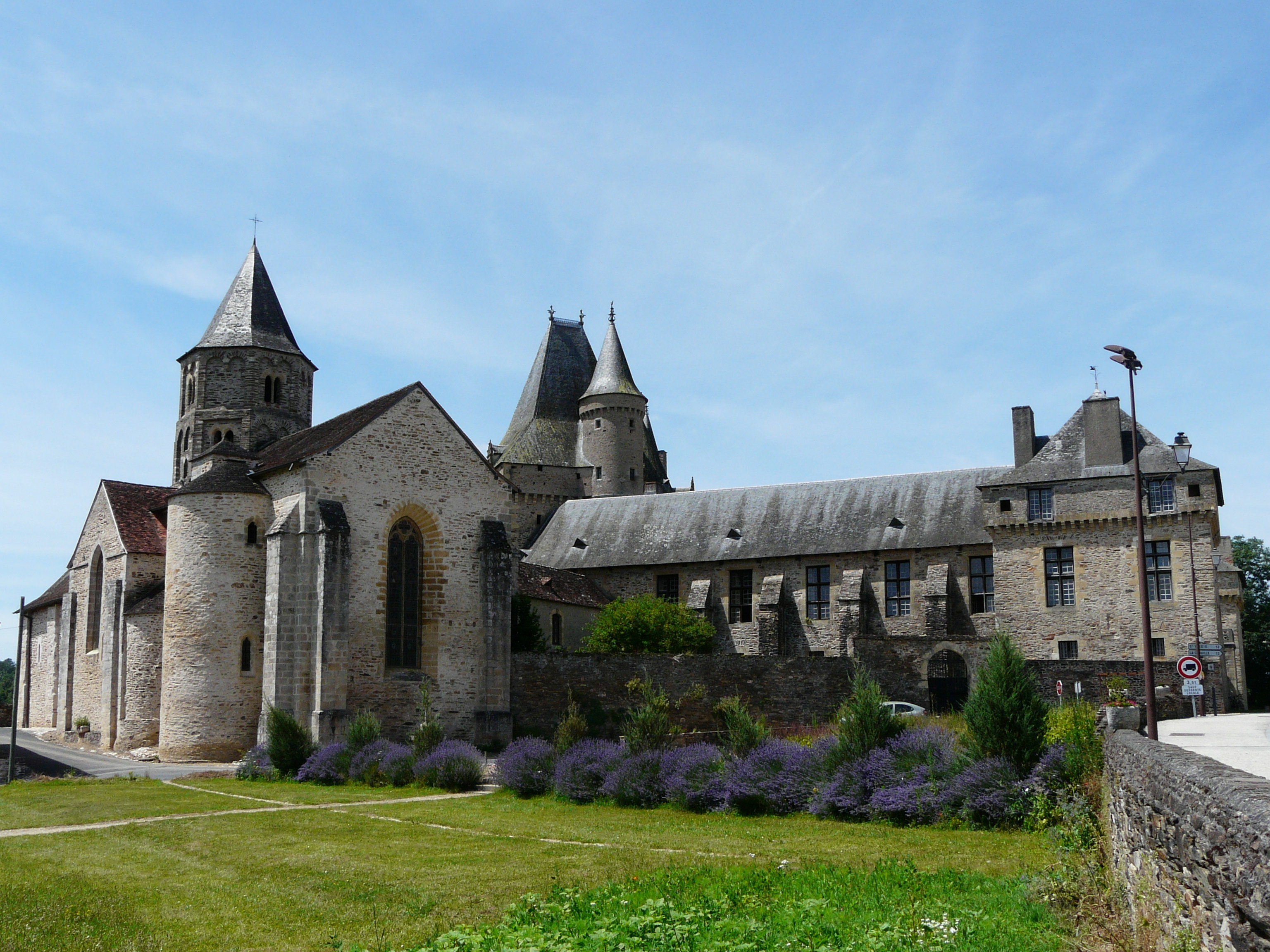 L'église et le château de Jumilhac, Jumilhac-le-Grand, Dordogne, France.